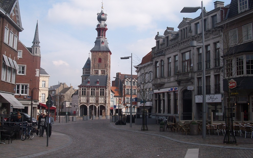 Belfort van Tielt op de Markt - hét centrum van de stad in West-Vlaanderen - België